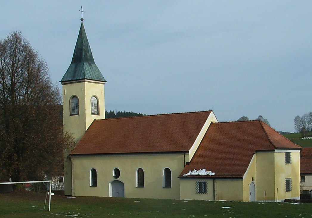 Schönau Kirche St. Laurentius (2012)